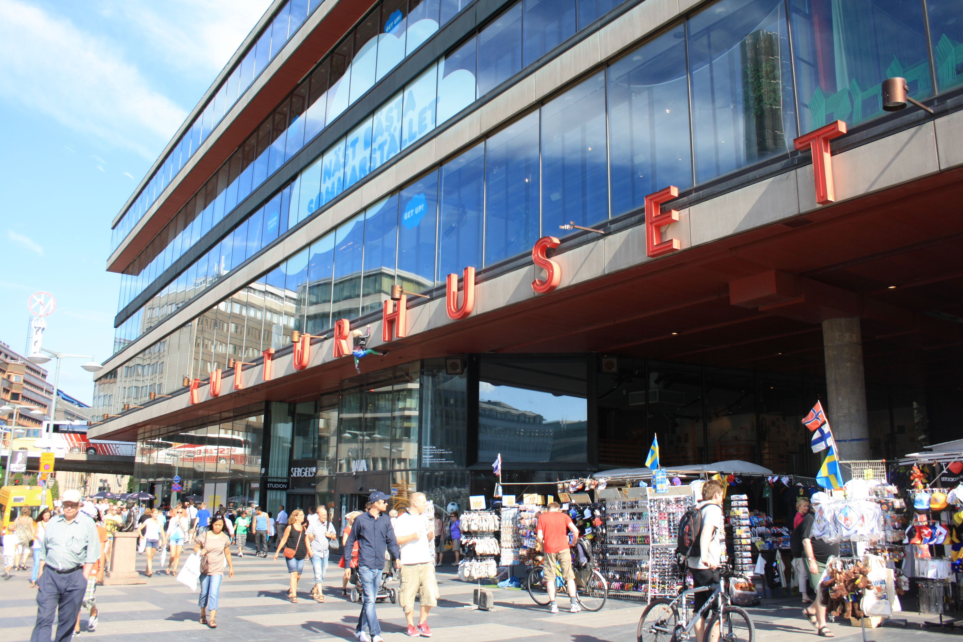 La photo de l'entrée de la maison de la culture (Kulturhuset) à Stockholm, en Suède .